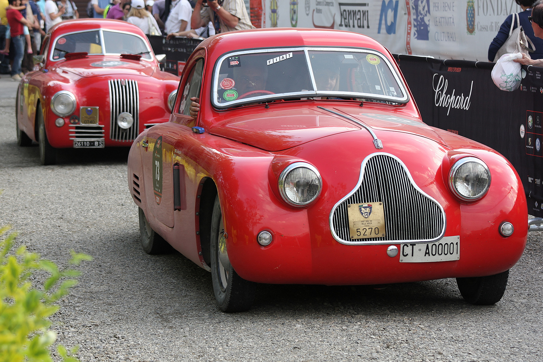 Mille Miglia 2011